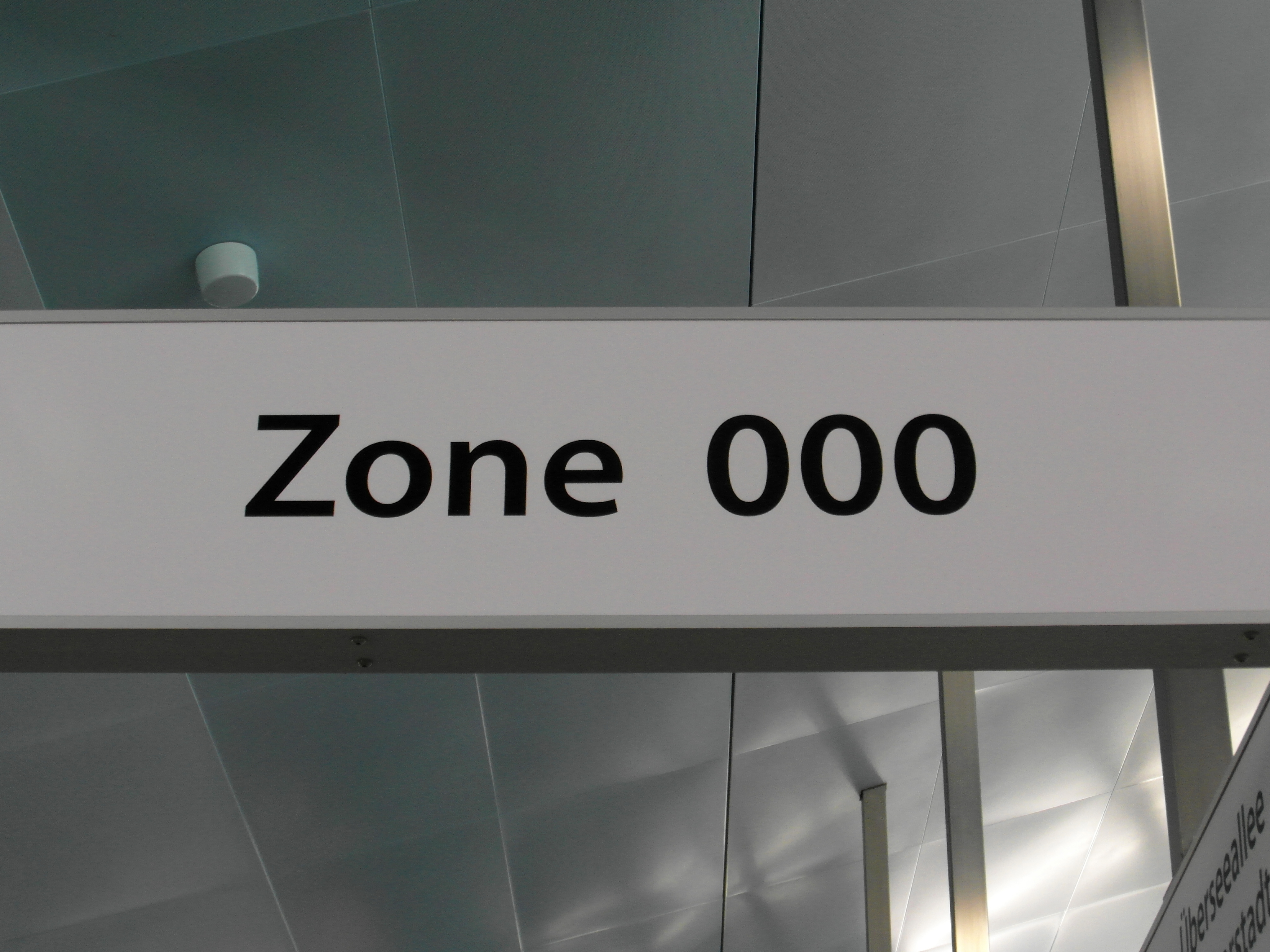 U-Bahnhof Überseequartier in Hamburg